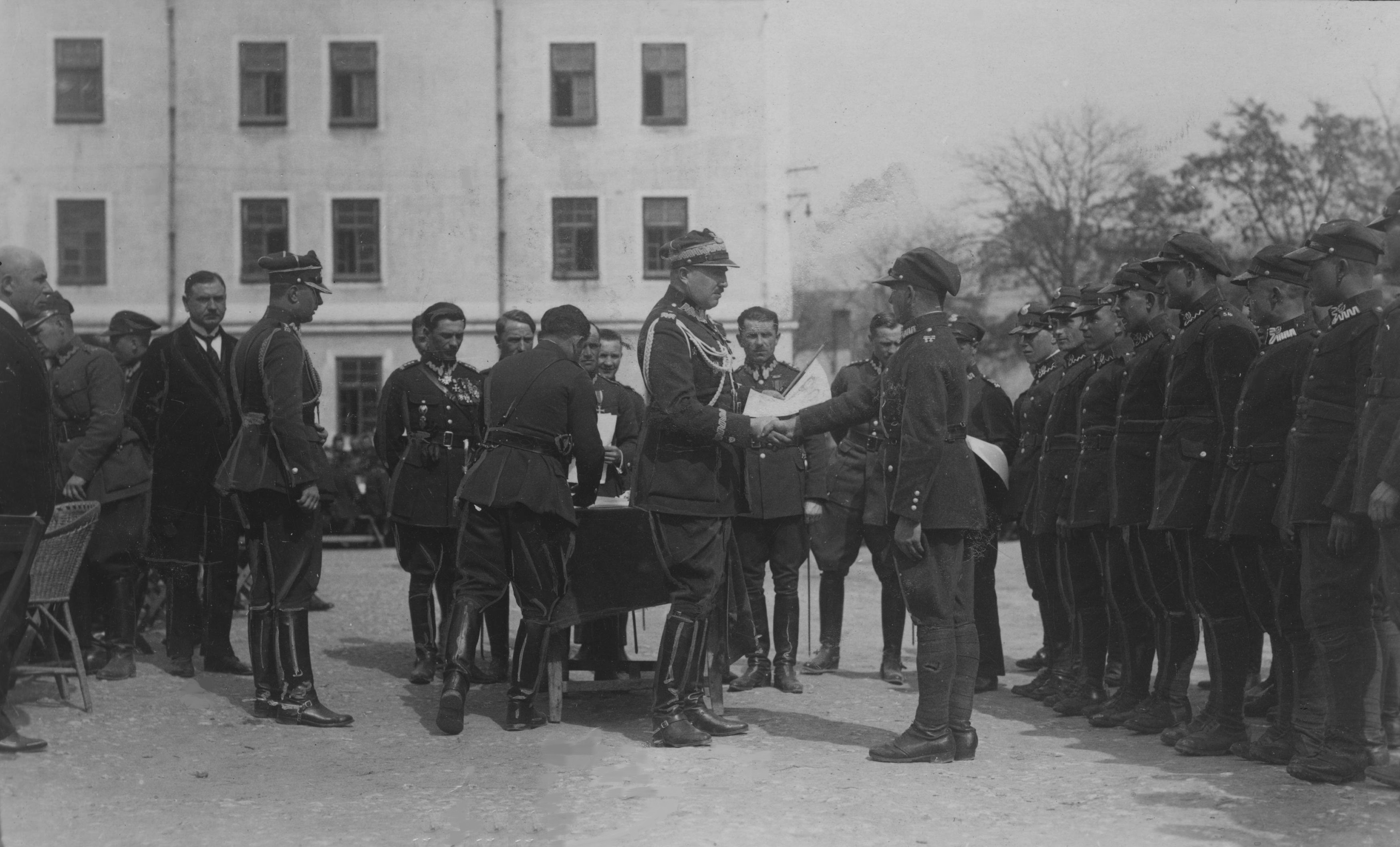 Święto 54 Pułku Piechoty Strzelców Kresowych w Tarnopolu. Gen. Stanisław Dowoyno-Sołłohub wręcza dyplomy żołnierzom. Koncern Ilustrowany Kurier Codzienny - Archiwum Ilustracji. Sygnatura: 1-W-1253